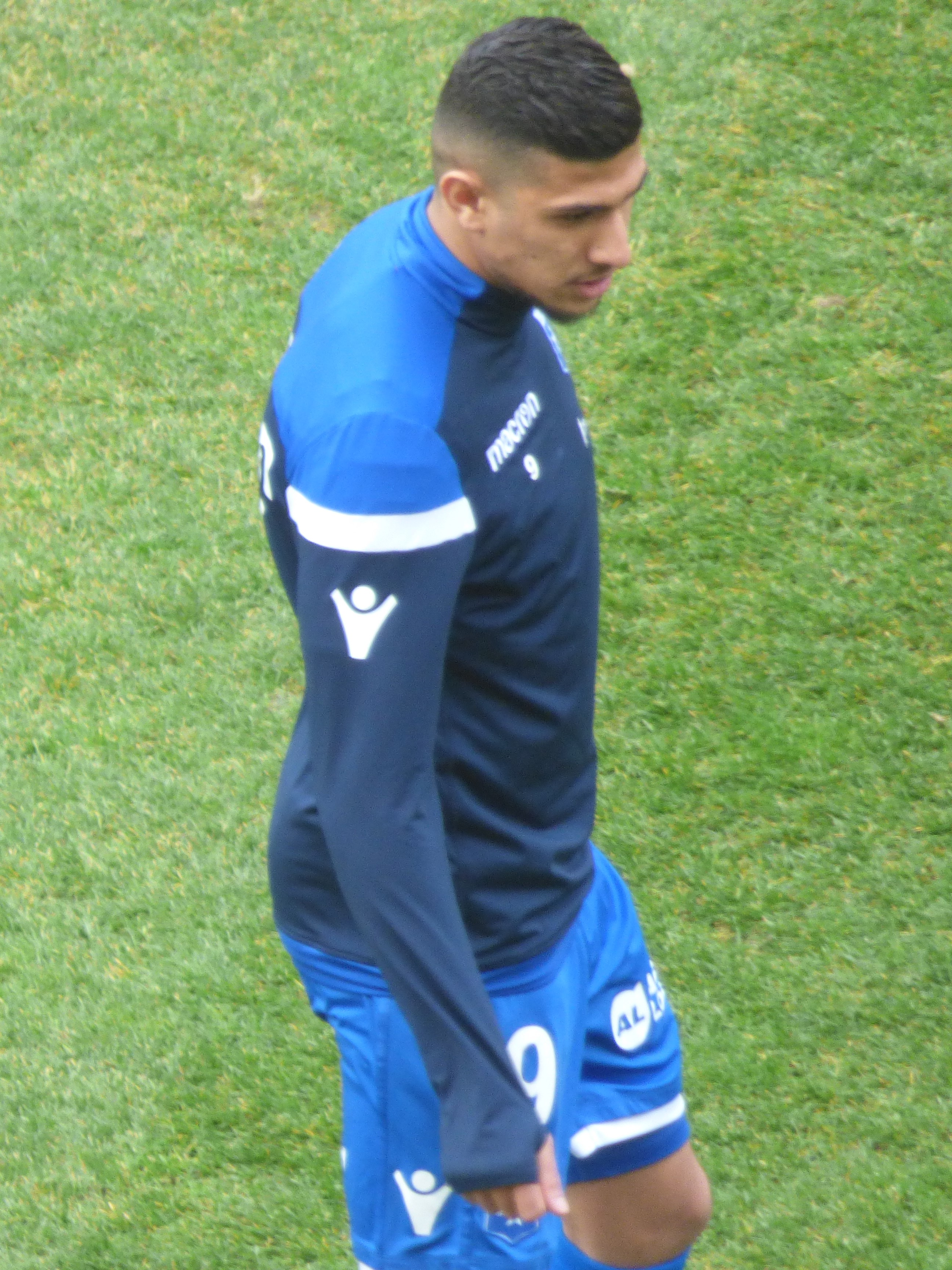 Yanis Merdji avant le match RC Lens - AJ Auxerre, comptant pour la 28ème journée du championnat de France de football de Ligue 2 2018-2019, le 9 mars 2019 au Stade Bollaert-Delelis.